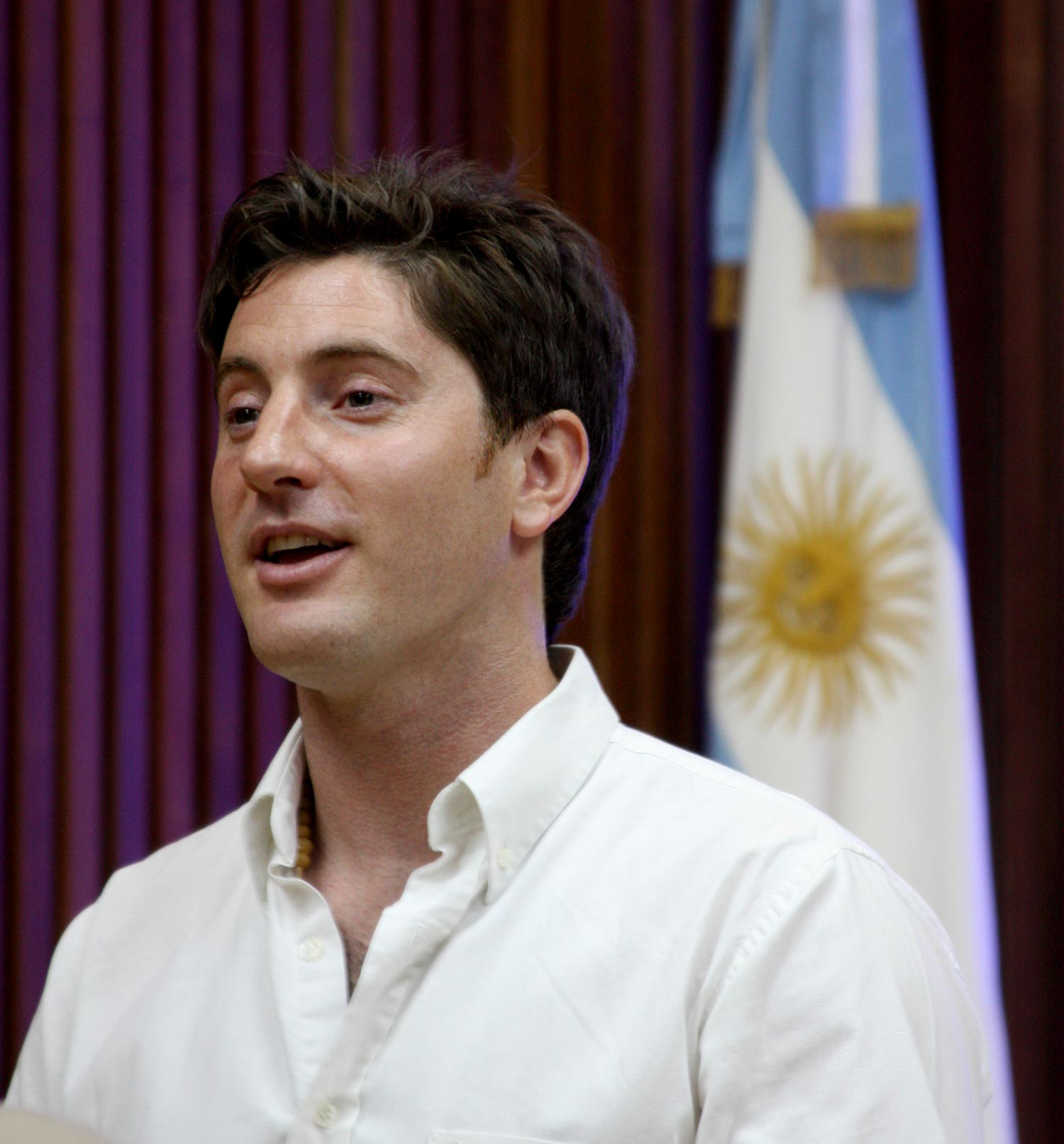 Nicolás García Mayor